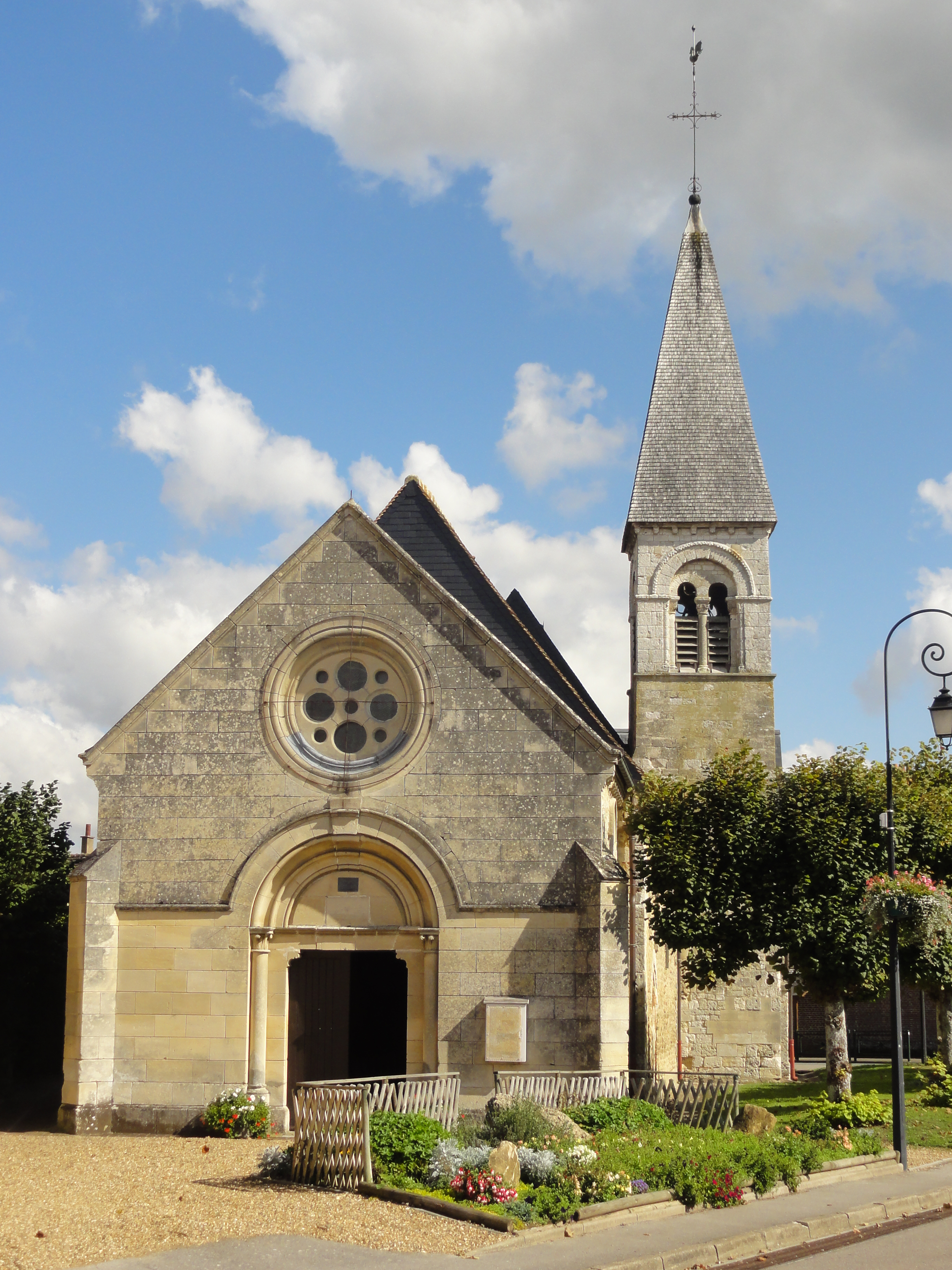 Église Saint-Lucien de Warluis - voir titre.